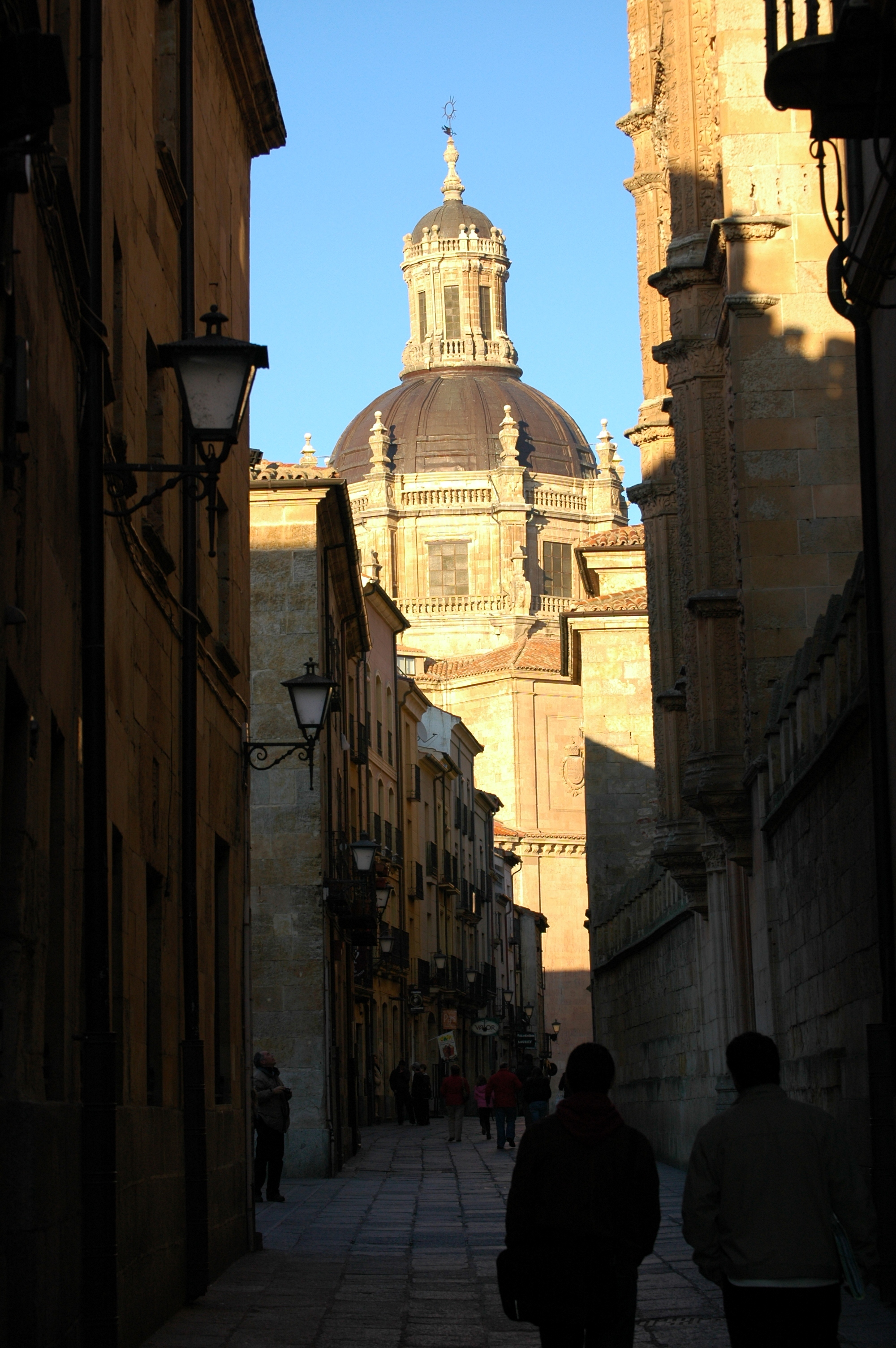 Calle Libreros - Salamanca